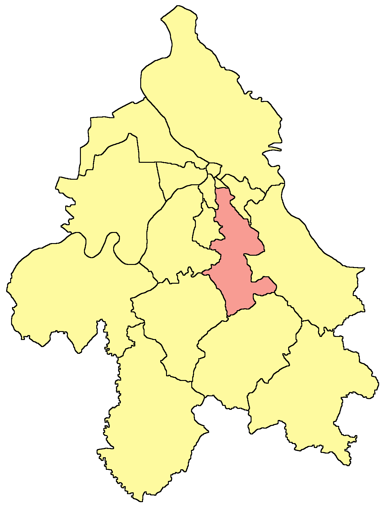 Belgrade municipality map